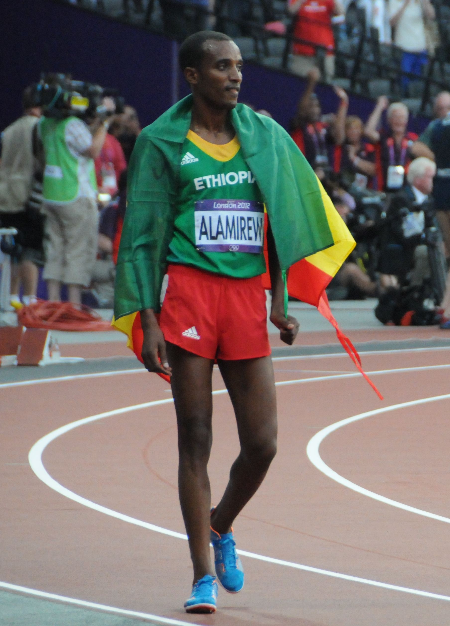 Les éthiopiens participants à la finale du 5000m de Londres.